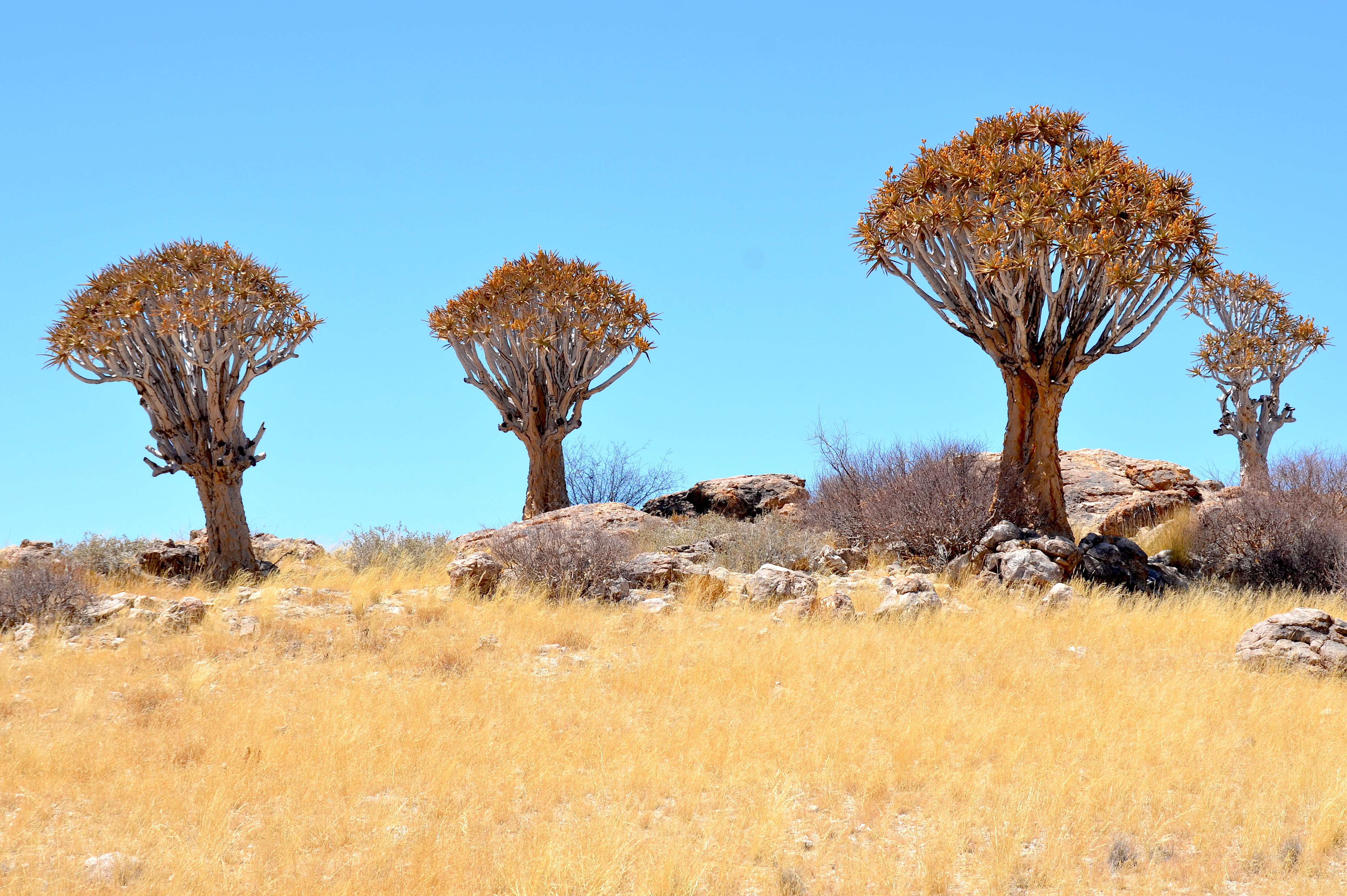 Köcherbäume in der Namib